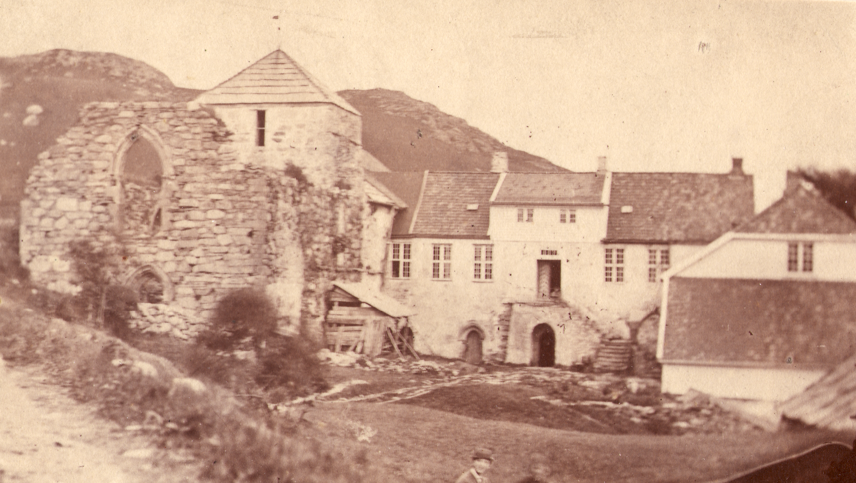 Utstein kloster i Mosterøy, Rogaland Klosterkirken sett fra sør-øst før restaurering 1868